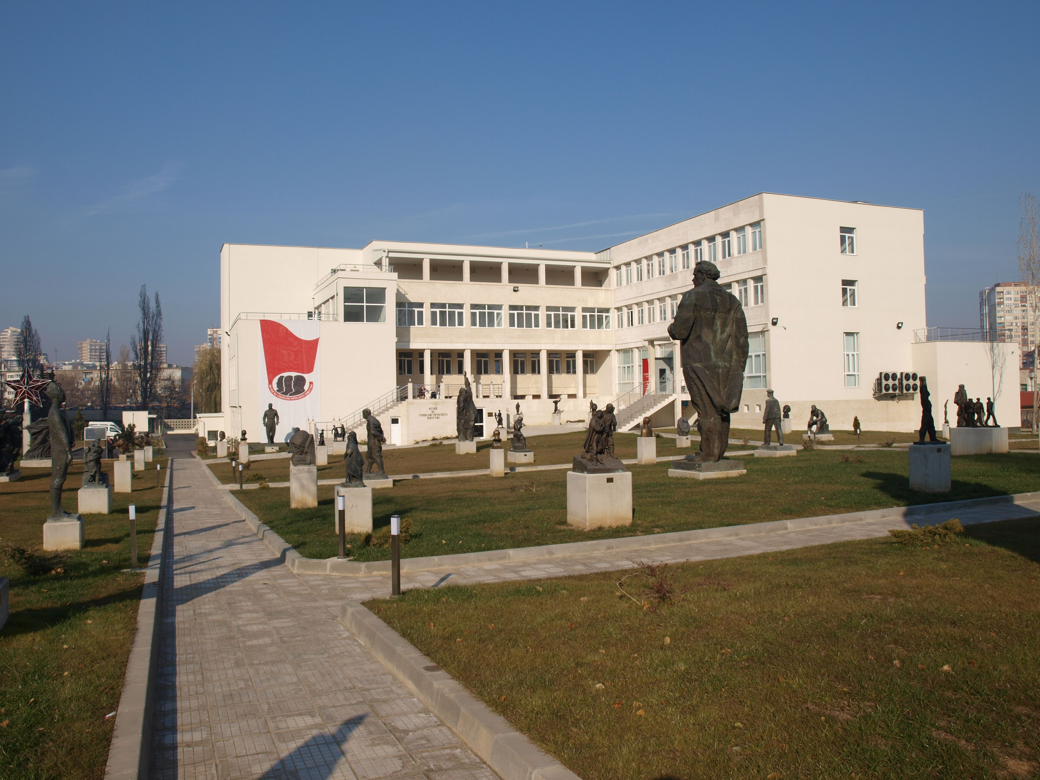 Сградата и парка на Музея на социалистическото изкуство в София.